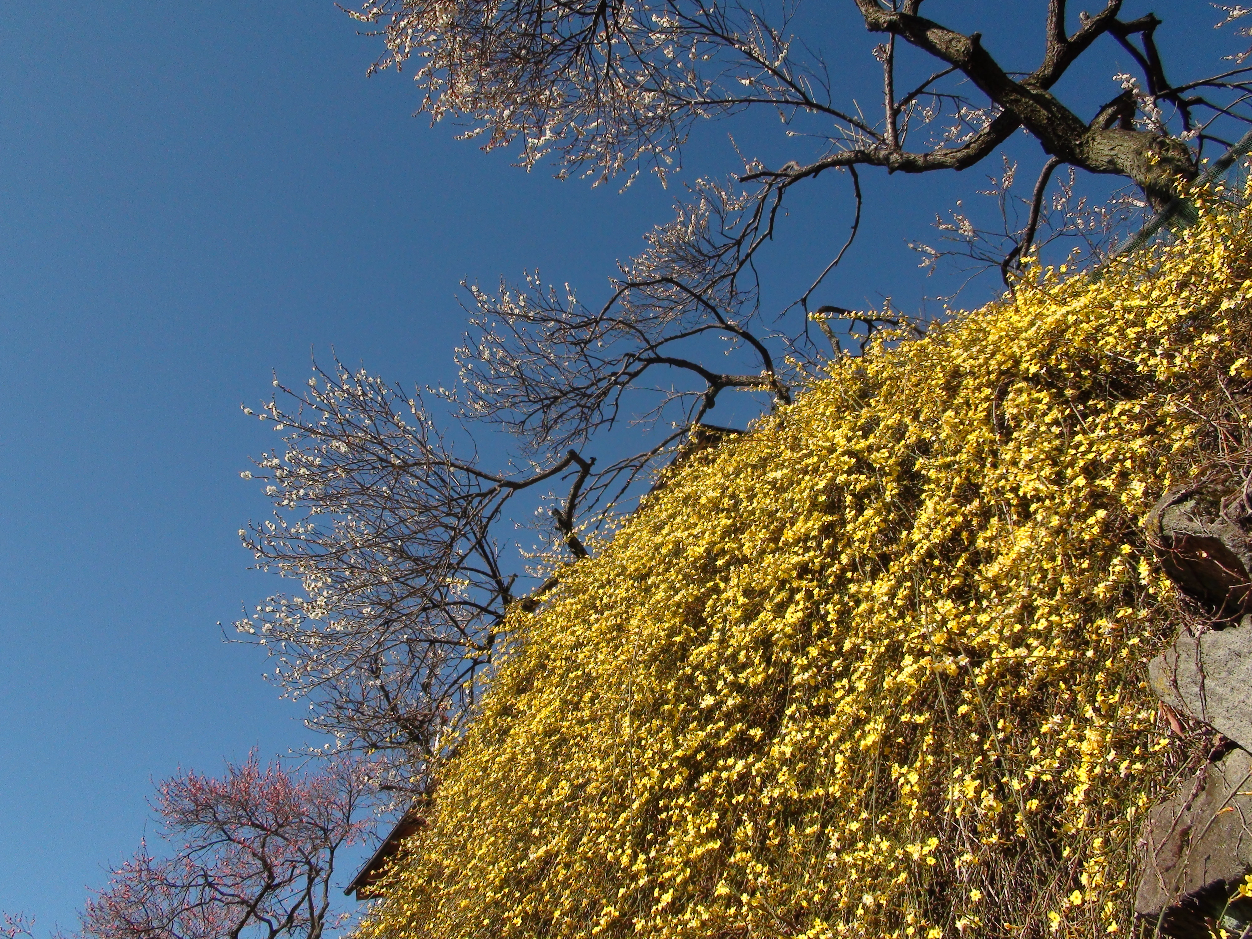 不老園レンギョウ